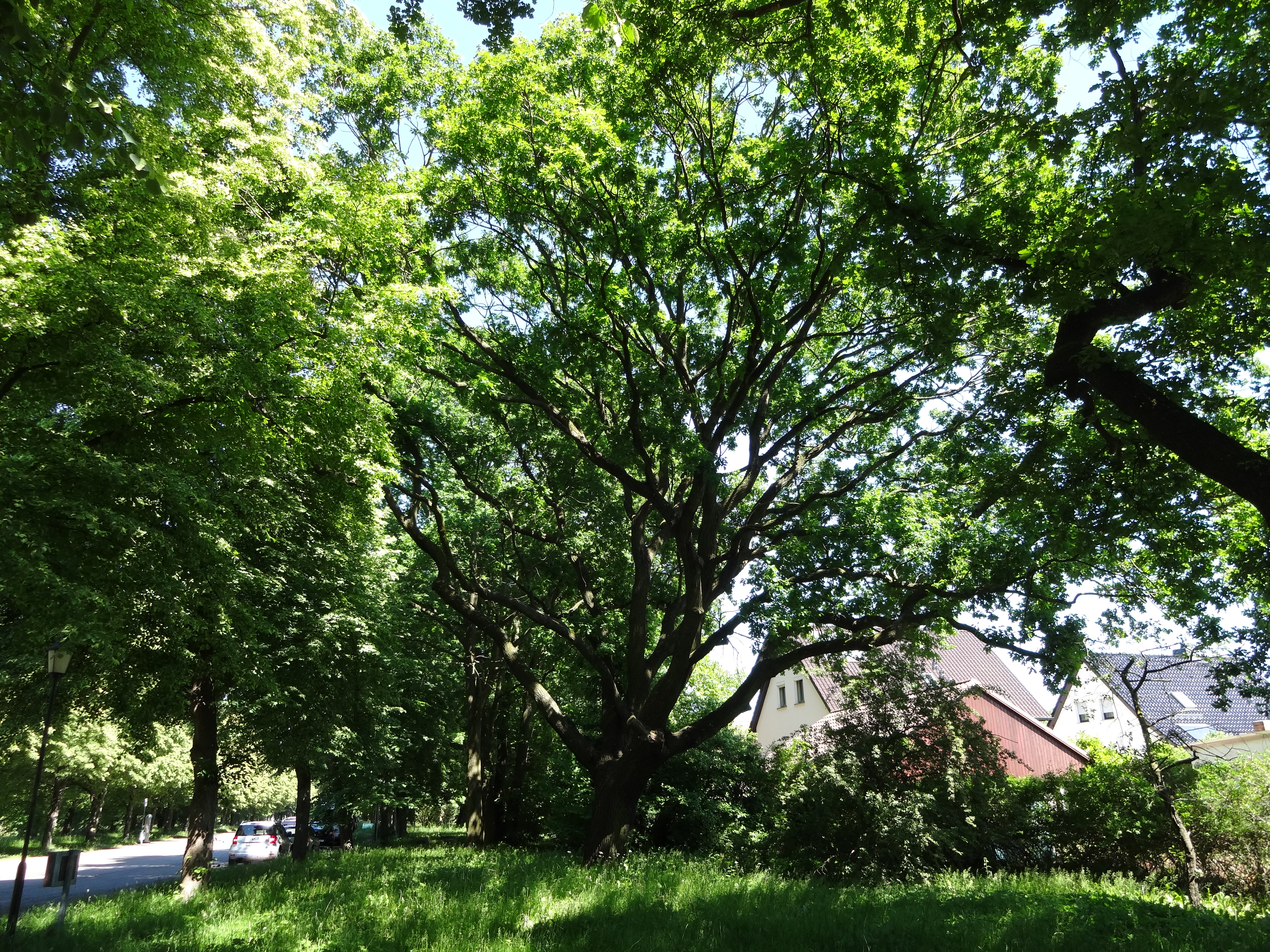 Naturdenkmal 0106-4 Stieleiche (Quercus robur) in Niemtsch ca. 45 m südöstlich von der Senftenberger Straße / Einmündung in die Seestraße